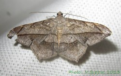 Chiasmia simplicilinea